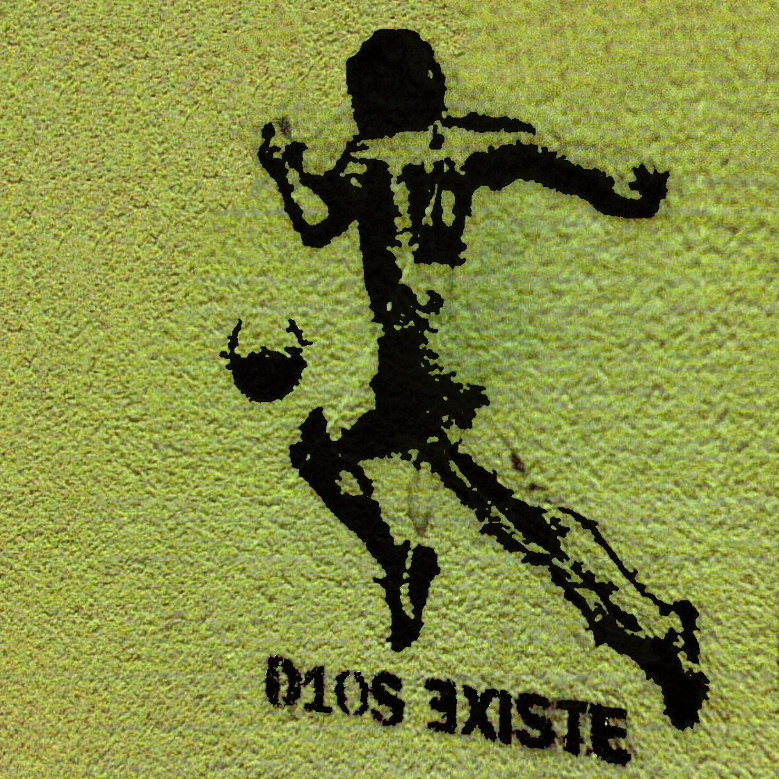 Estarcido dedicado al Pelusa. Probablemente sea obra de un seguidor de la Iglesia Maradoniana Santamaradona, por Mano Negra.